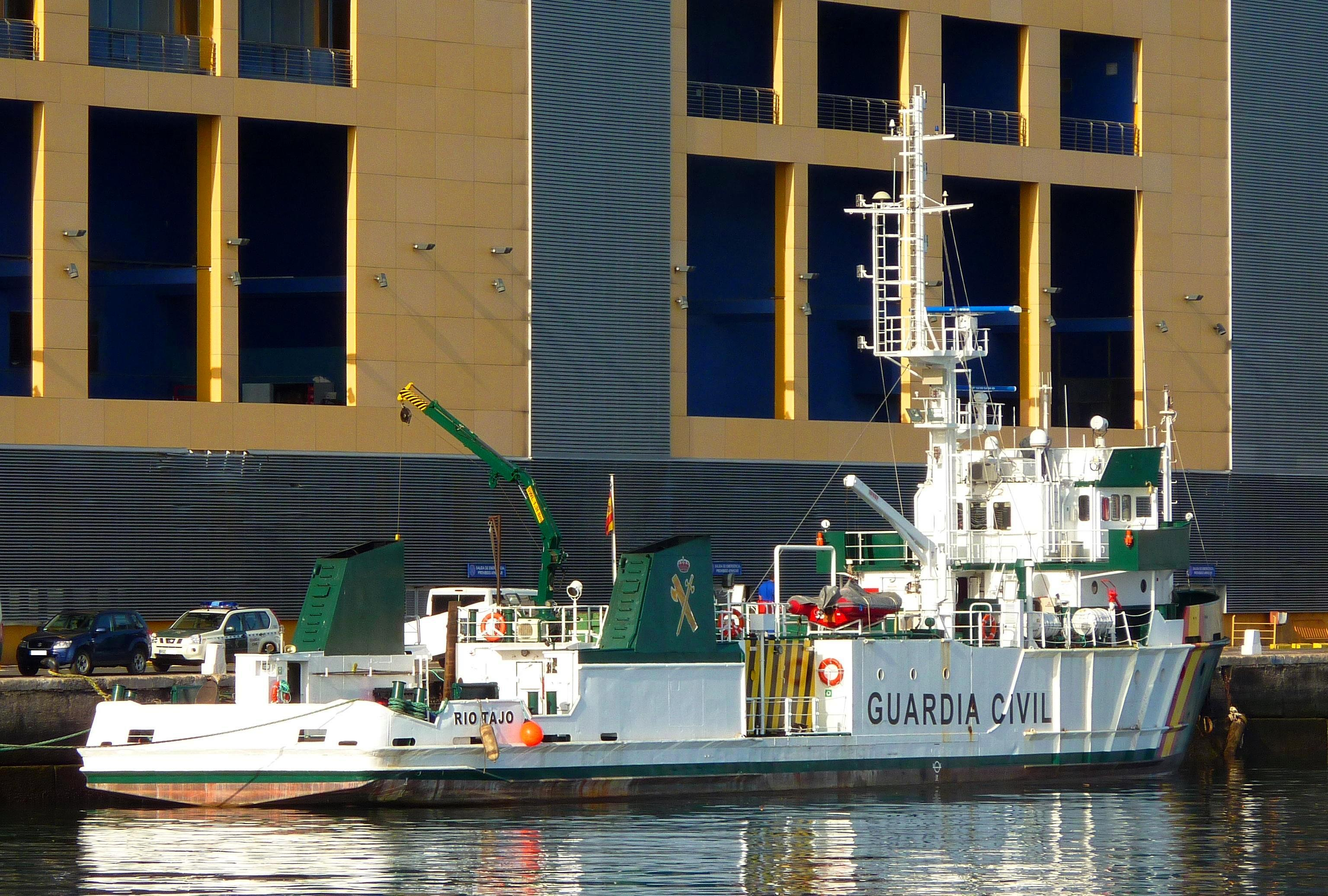 Patrullero Río Tajo del Servicio Marítimo de la Guardia Civil.